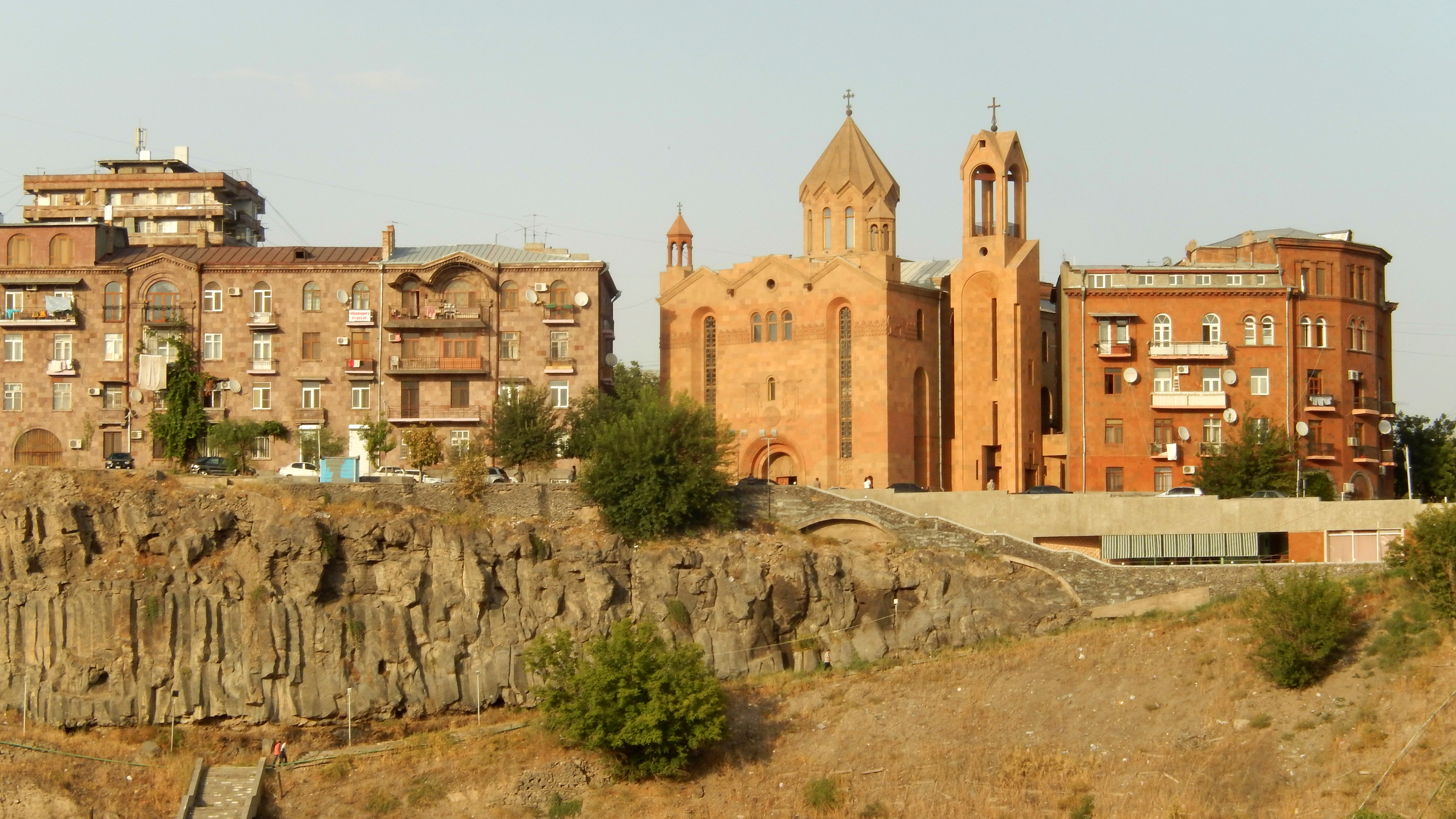 Սուրբ Սարգիս եկեղեցի 6/75